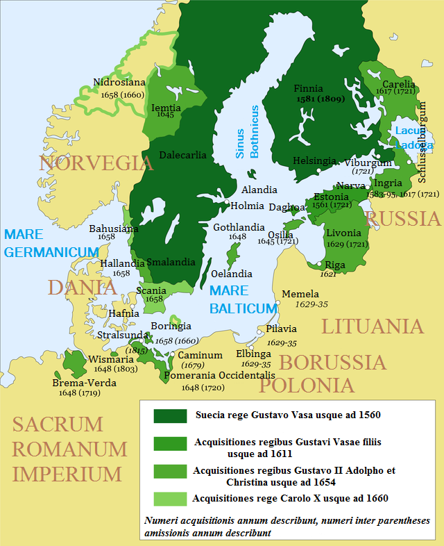 Imperium Suecicum Latine